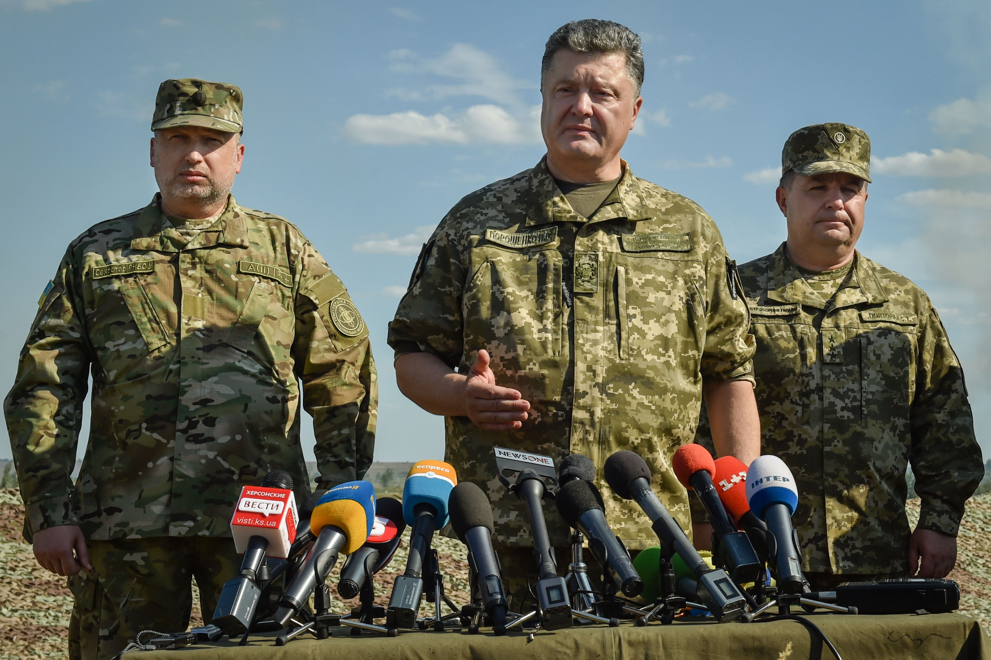 Встреча Порошенко с военными и участие в передаче военной техники для войны на Донбассе, 22 августа 2015 года, г. Чугуев Харьковской области